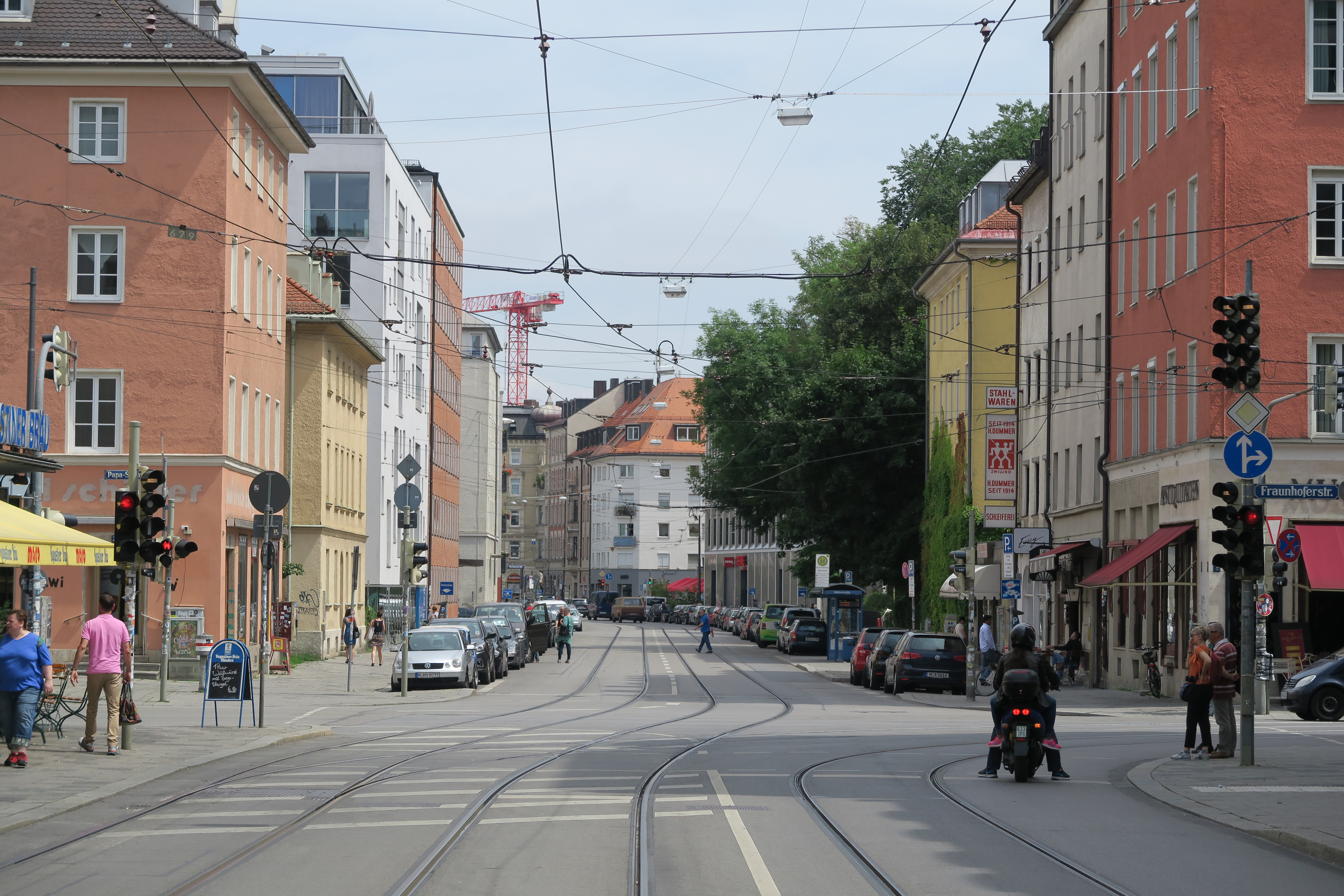 Kreuzung Müllerstraße und Fraunhoferstraße in München